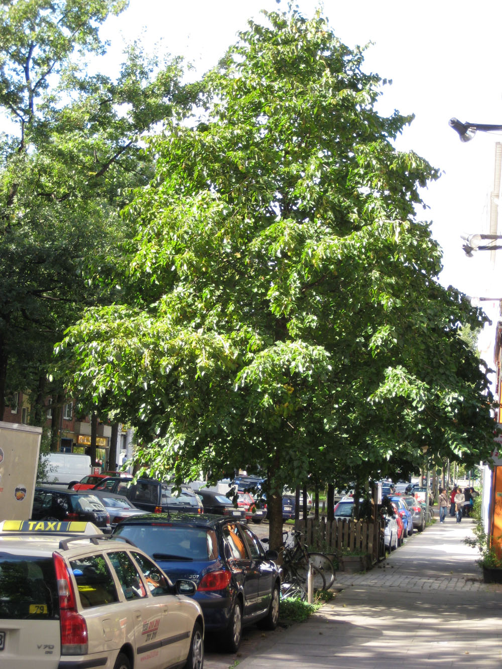 Baumhasel Pflanze